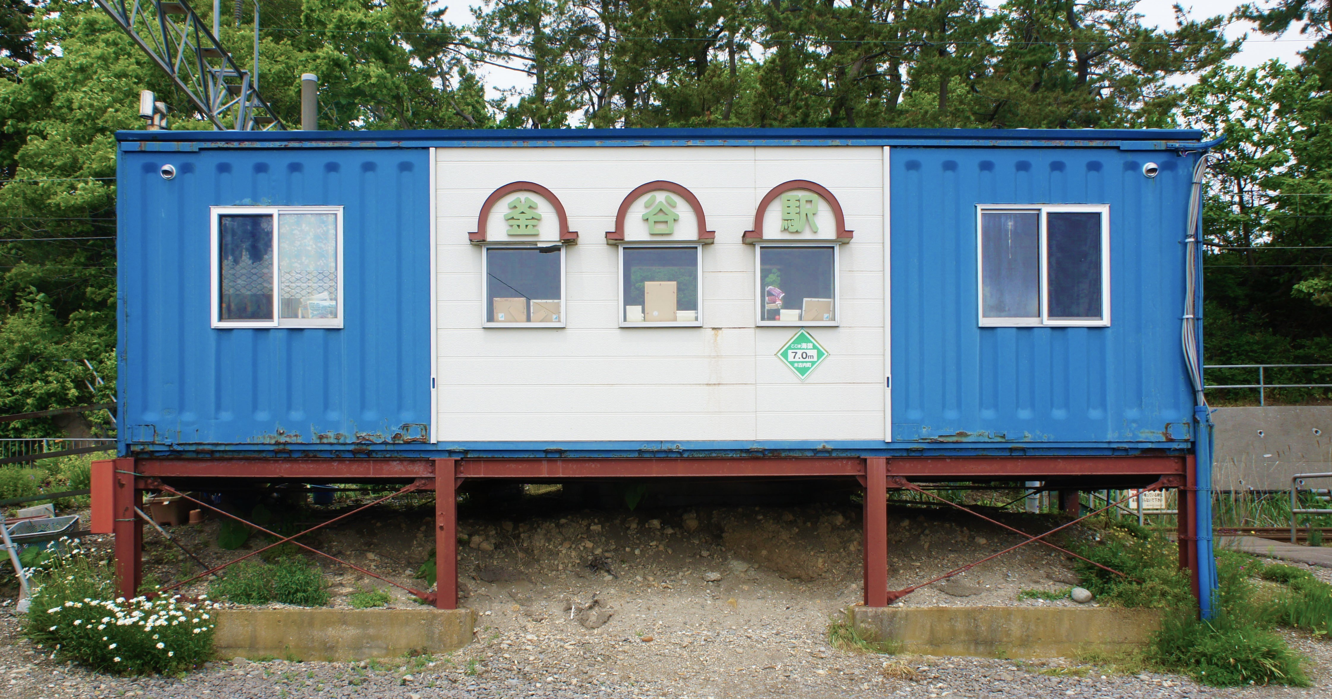 道南いさりび鉄道線・釜谷駅の駅舎